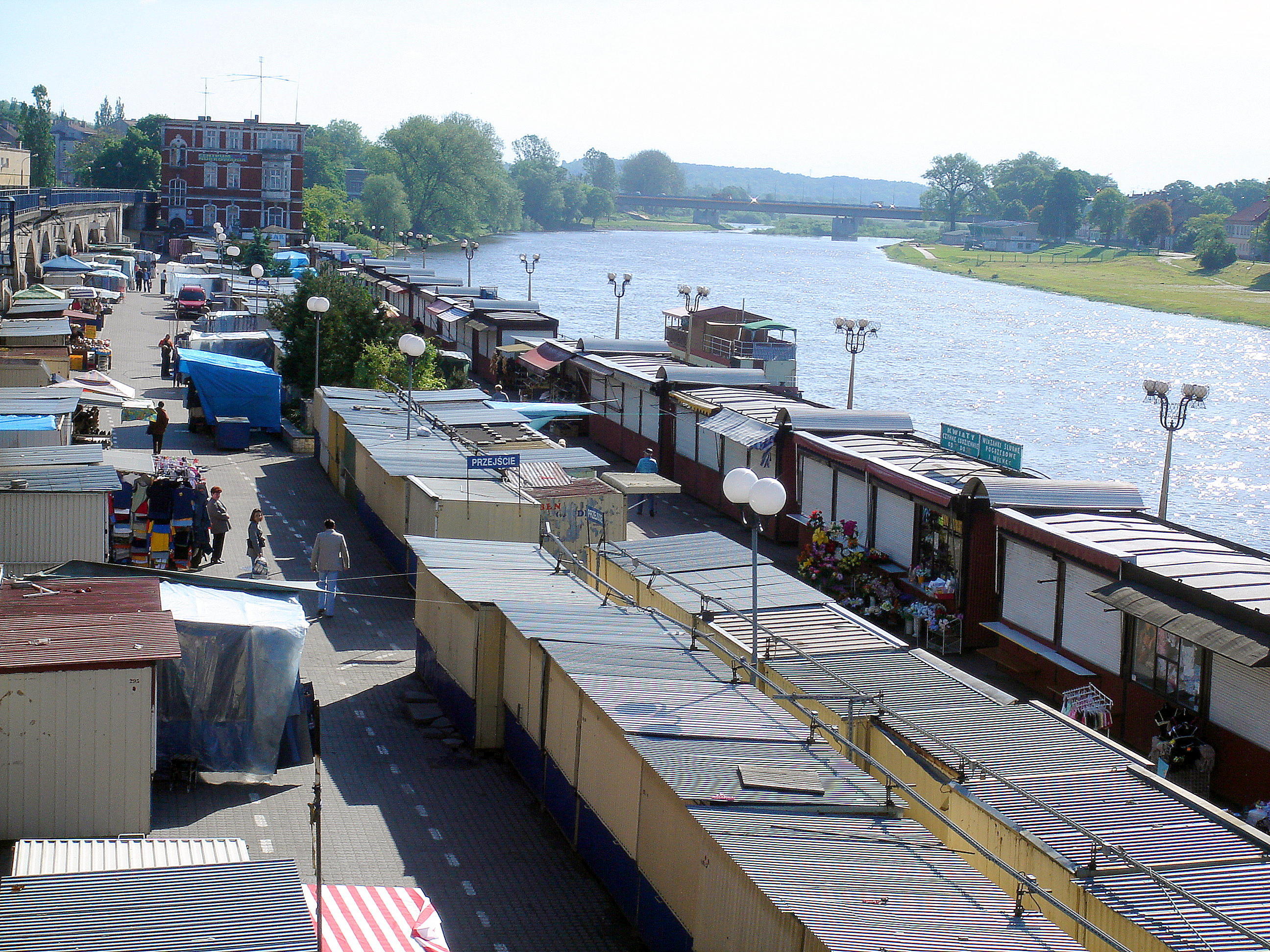 Gorzów Wlkp. Bulwar z urządzonym na nim targowiskiem.